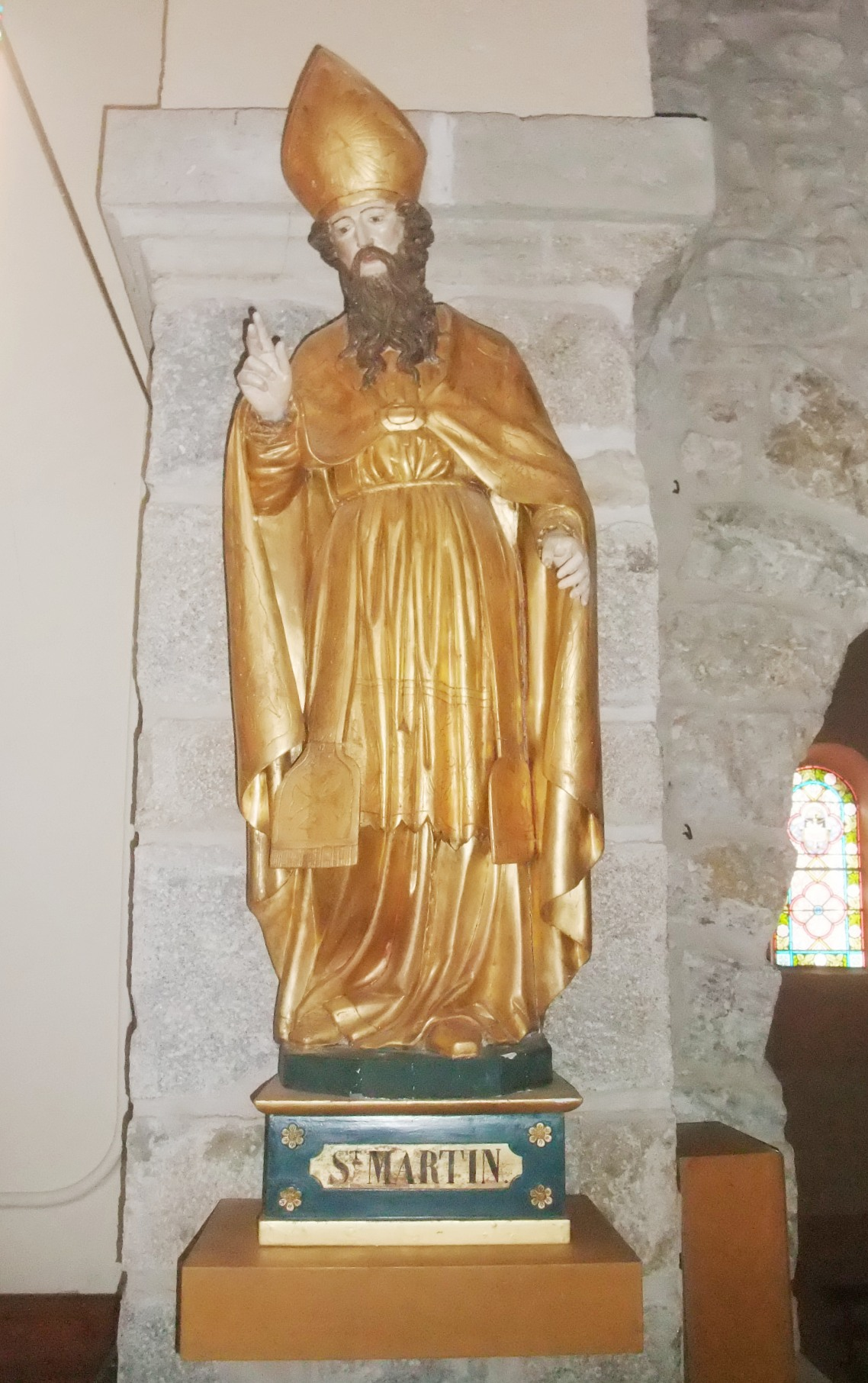 Roiffieux église St-Martin